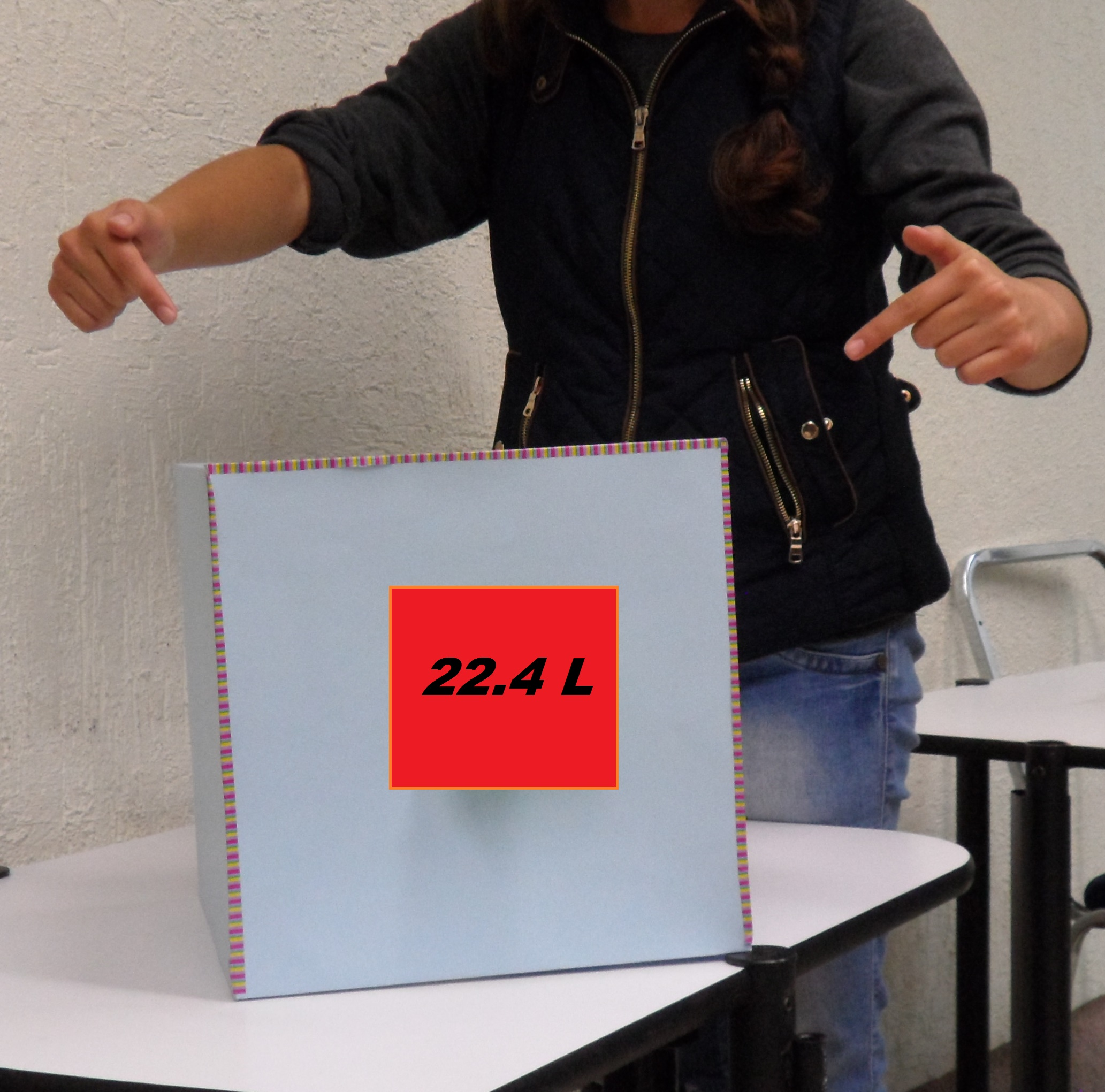 Un mol de cualquier gas en condiciones normales de presión y temperatura tiene un volumen de 22.4 L